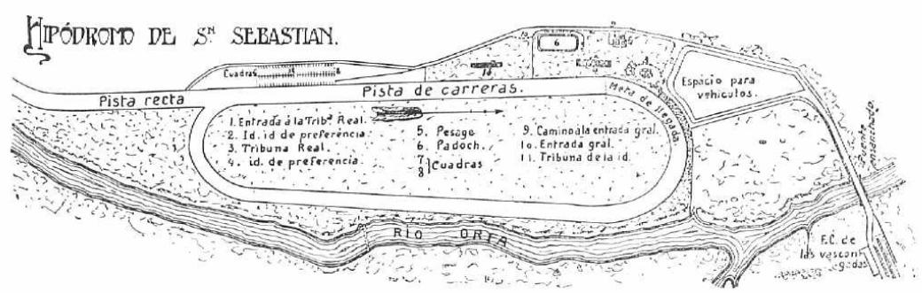 1916 Lasarteko hipodromoa planoa